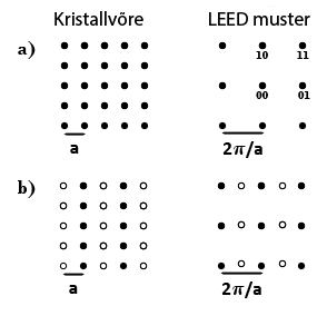 Pealisstruktuuride tekkimine. Kristallvõre ja pöördvõre võrdlus